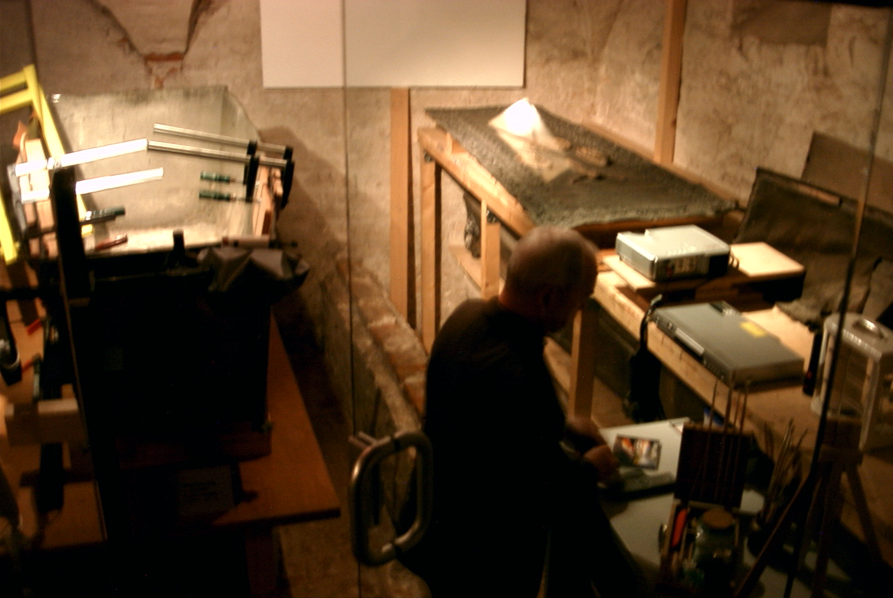 Restaurierung der Herzogssärge in der Fürstengruft